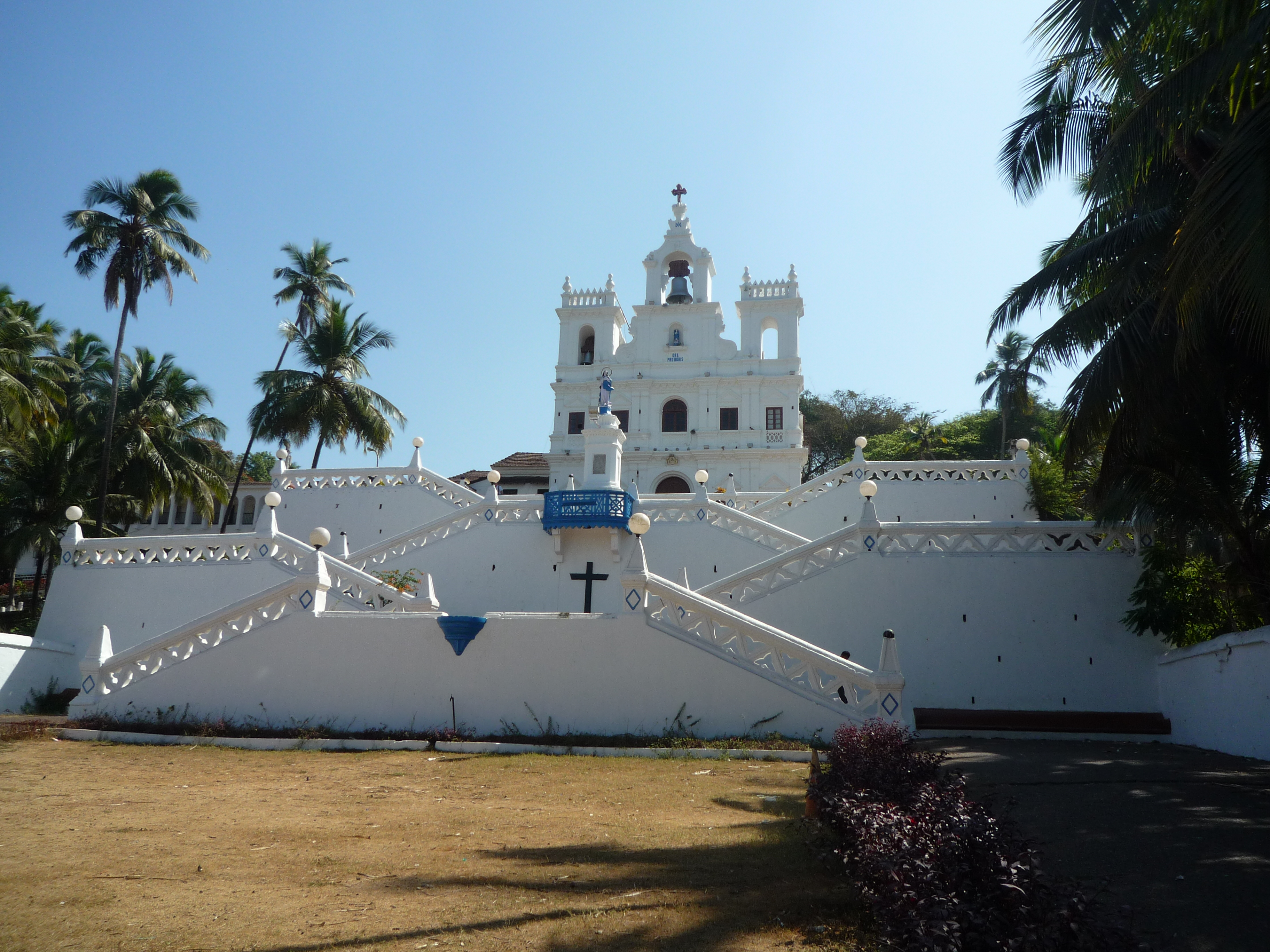 Церковь Непорочного зачатия Божьей Матери